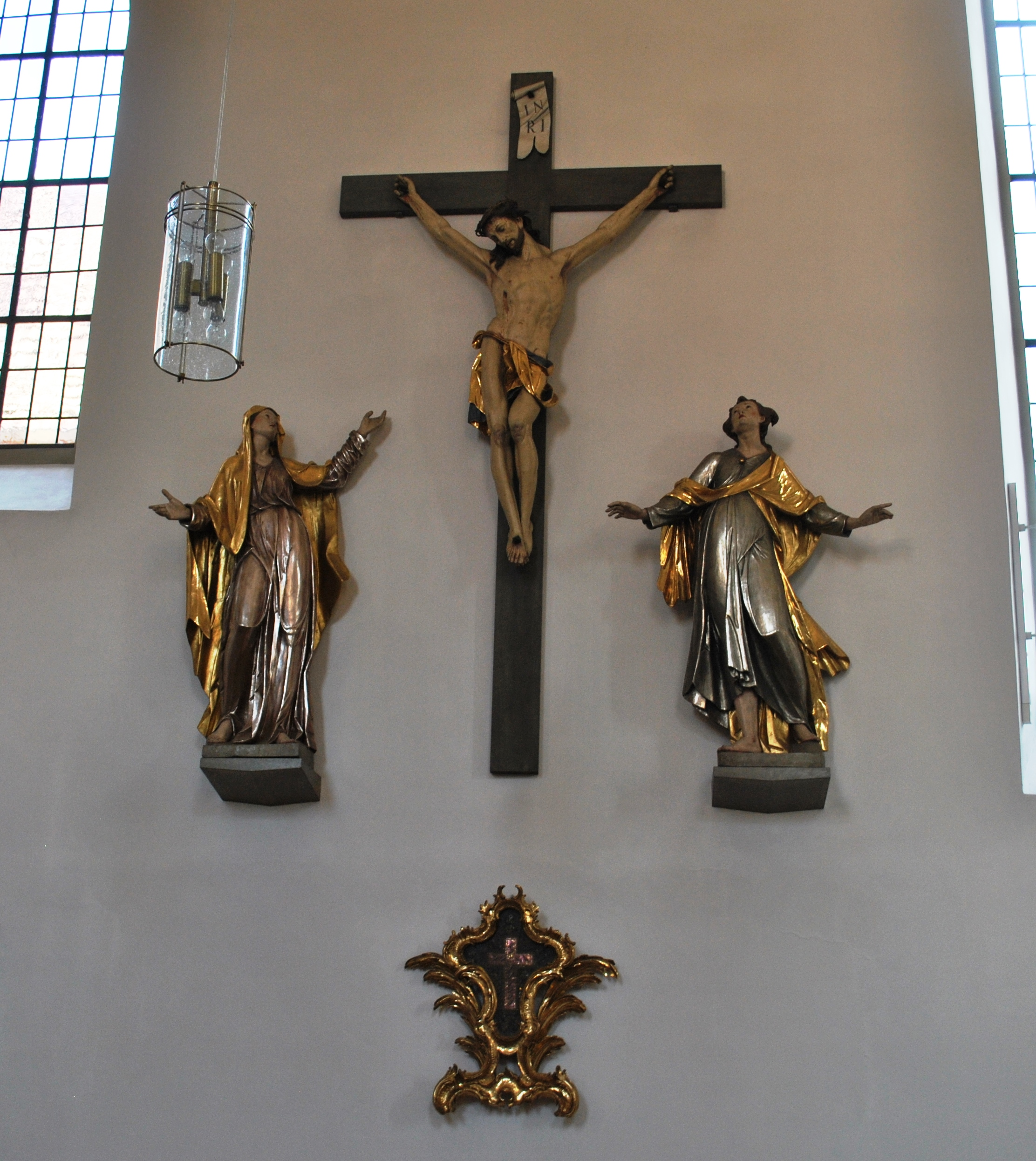 Katholische Pfarrkirche St. Bartholomäus Turm 1497, Langhaus und Chor 1804; mit AusstattungThis is a photograph of an architectural monument.